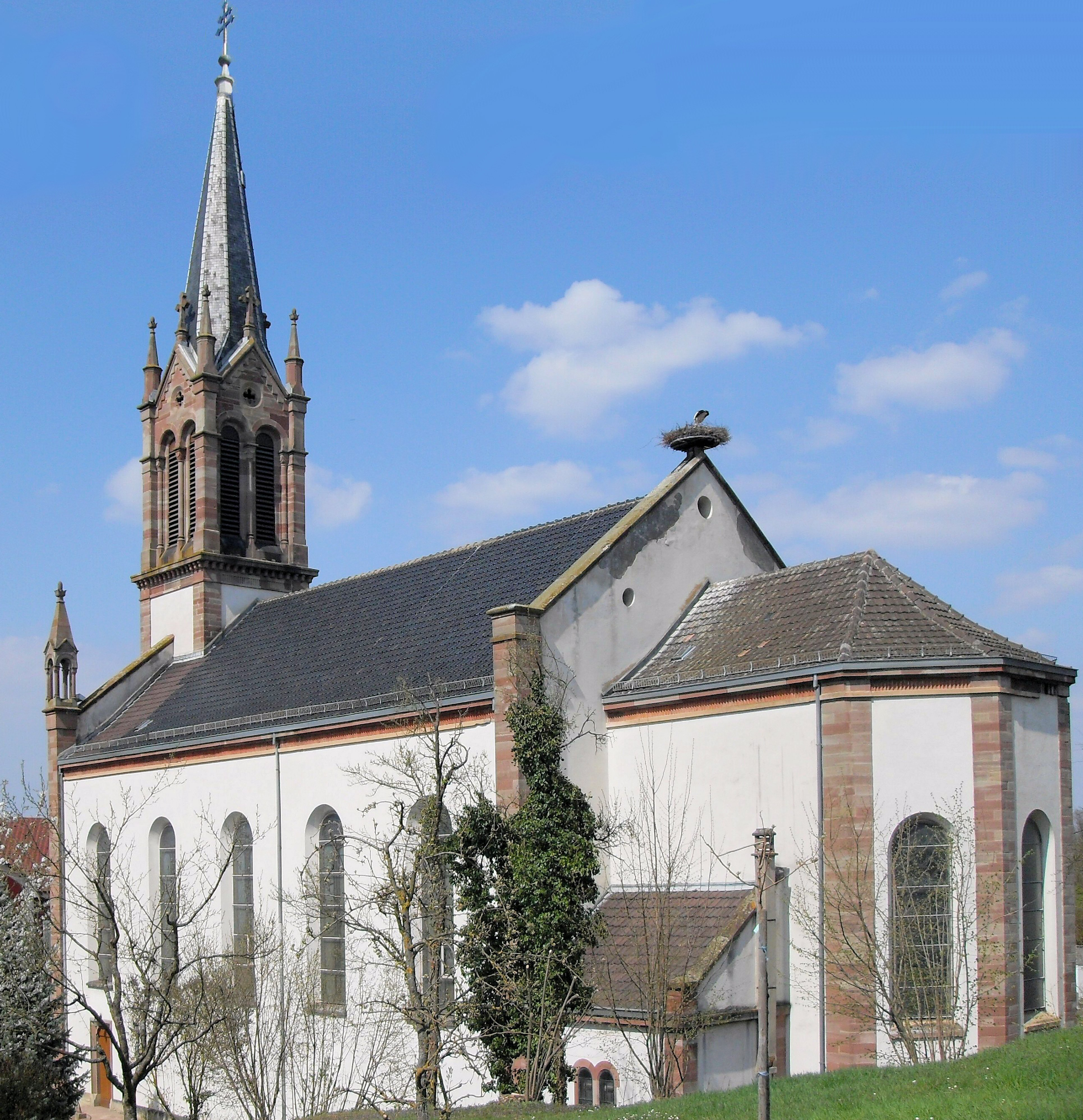 L'église Saint-Nicolas à Dietwiller